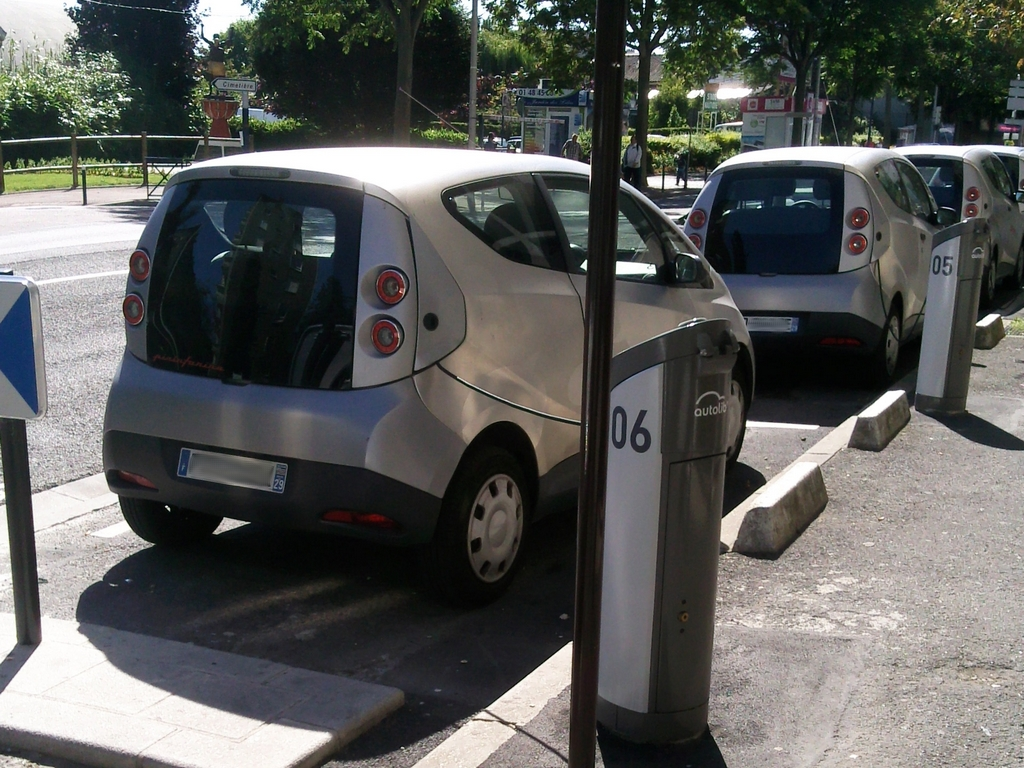 Station Autolib' à Drancy, dans le quartier Centre (rue Jean Jaurès)